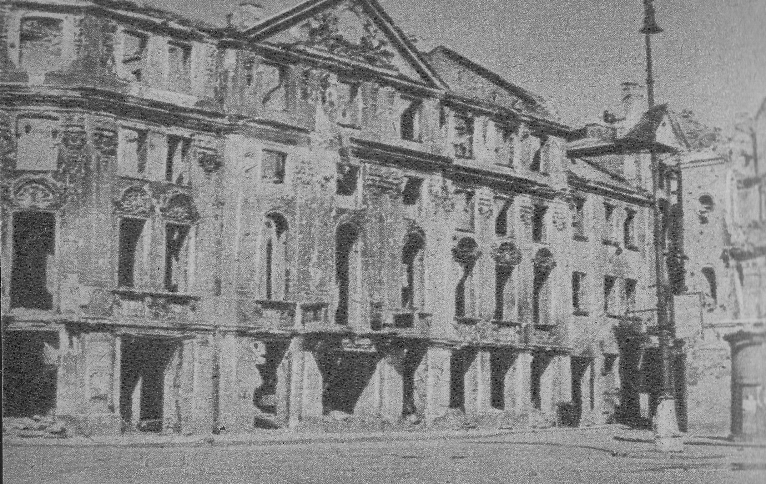 Zniszczony Pałac Wesslów (Poczta Saska) po wojnie